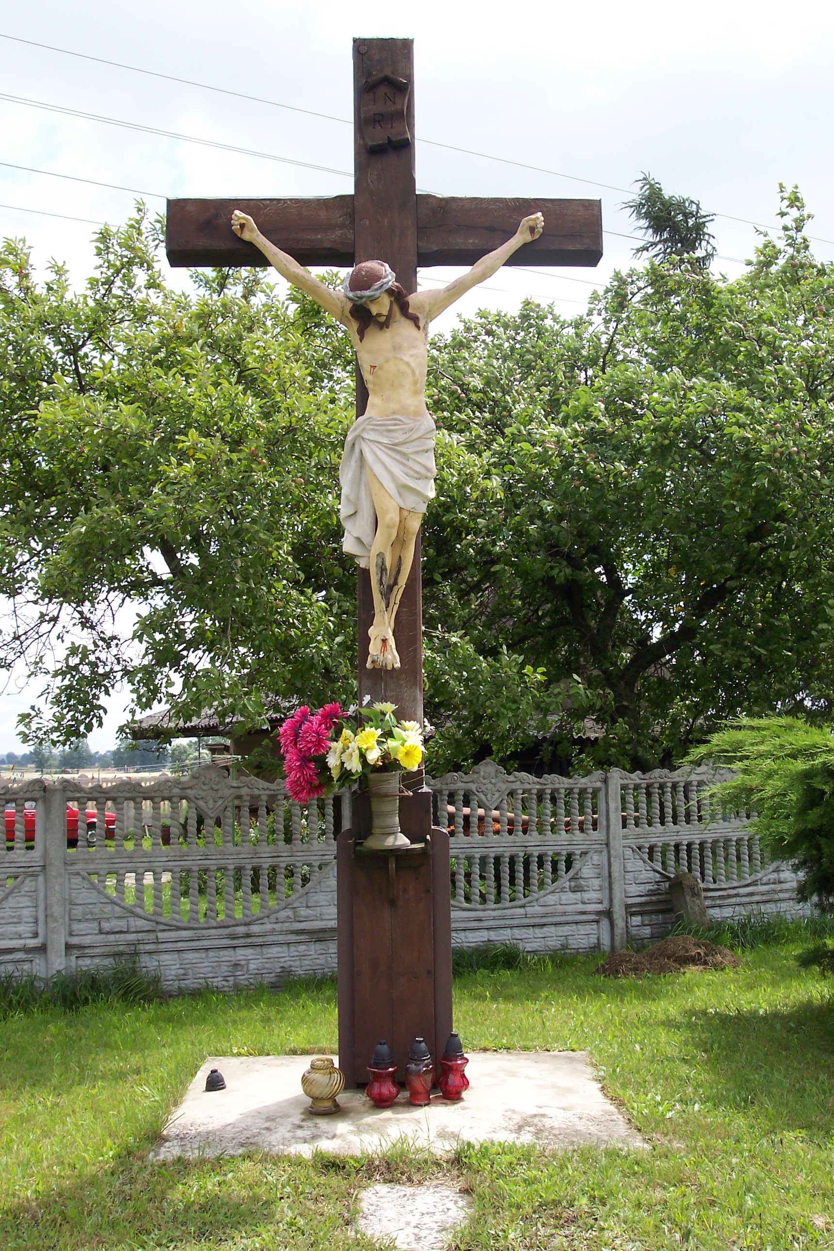 Krzyż przydrożny w Molnej